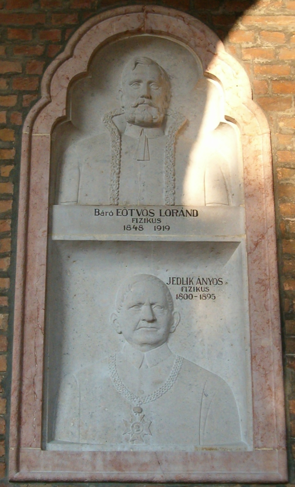 Jedlik Ányos és Eötvös Loránd fizikusok szobra a szegedi panteonban (Körmendi Frimm Jenő műve) photo by uploader